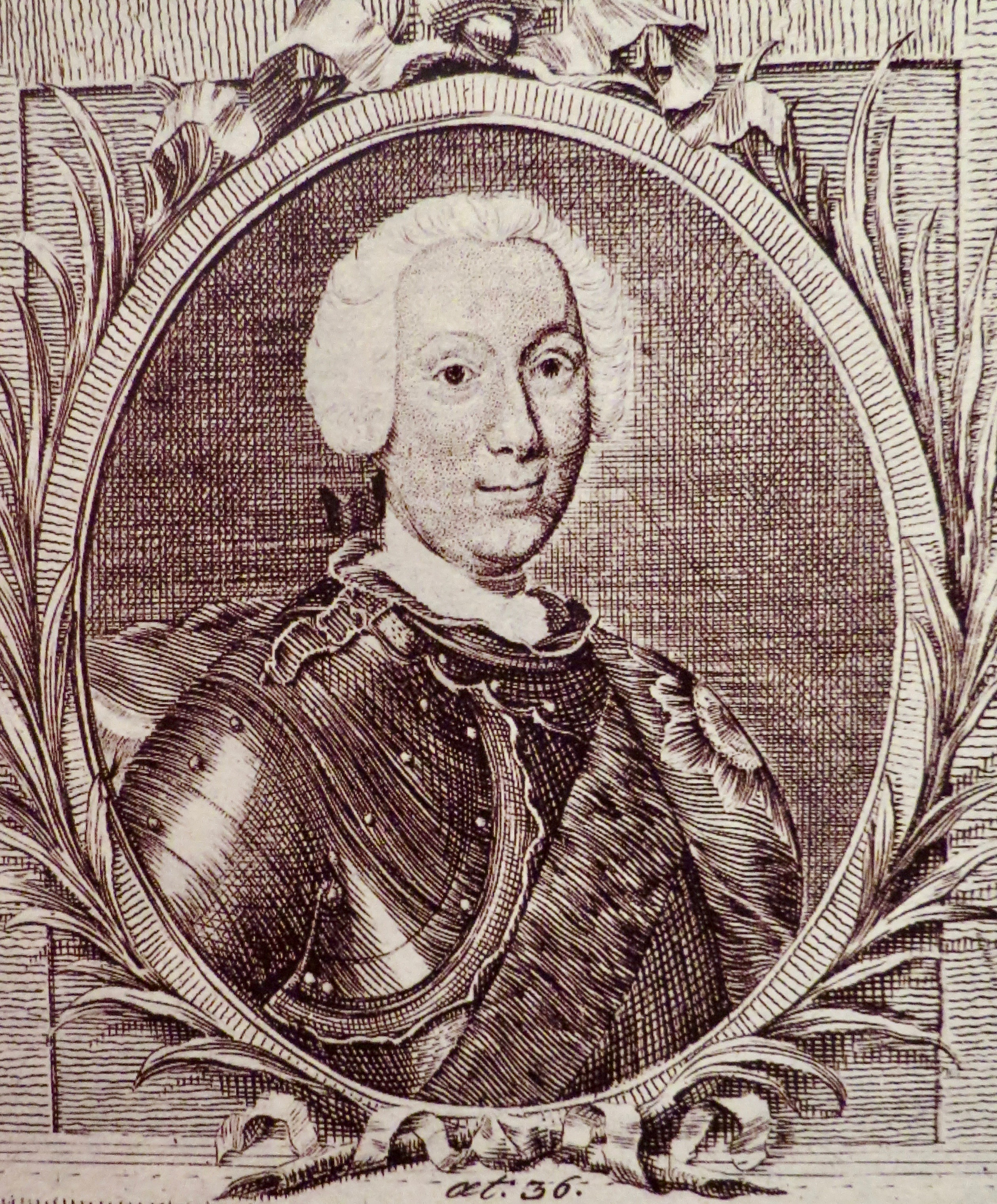 Frederik af Slesvig-Holsten-Sønderborg-Glücksborg, fra kobberstik af Andreas Stöttrup, Sønderborg Slot